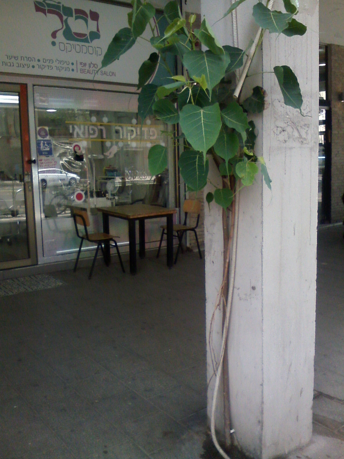 פיקוס קדוש במדרכה